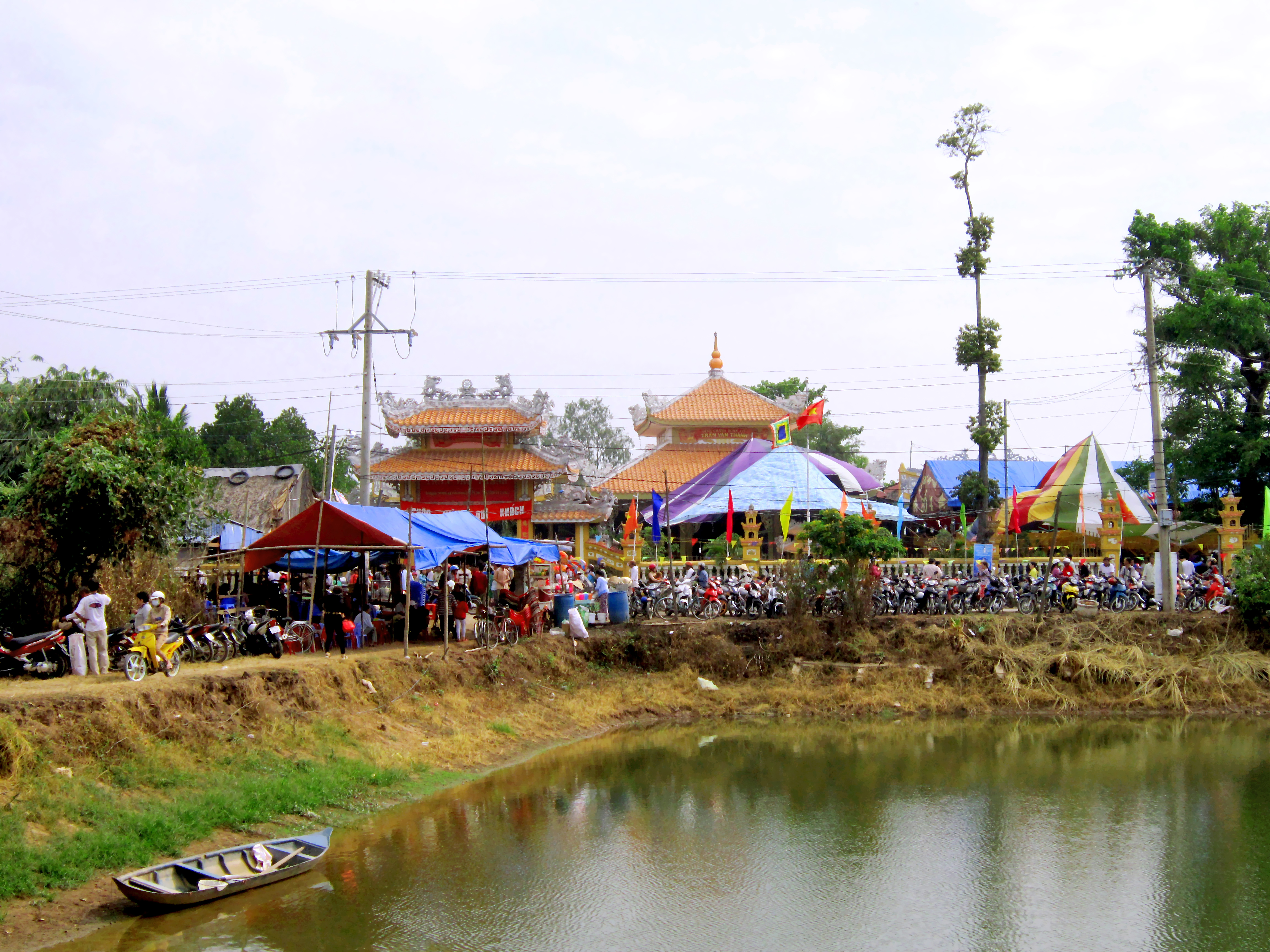 Dinh Chánh Quản cơ Trần Văn Thành (? - 1873) ở Cồn Nhỏ, thuộc ấp Bình Thành, xã Phú Bình, huyện Phú Tân, tỉnh An Giang, Việt Nam. Đây là nơi sinh trưởng của ông. Ảnh chụp nhân kỷ niệm 141 năm ngày ông chống Pháp hy sinh trong cuộc khởi nghĩa Bảy Thưa (21-2 âm lịch).